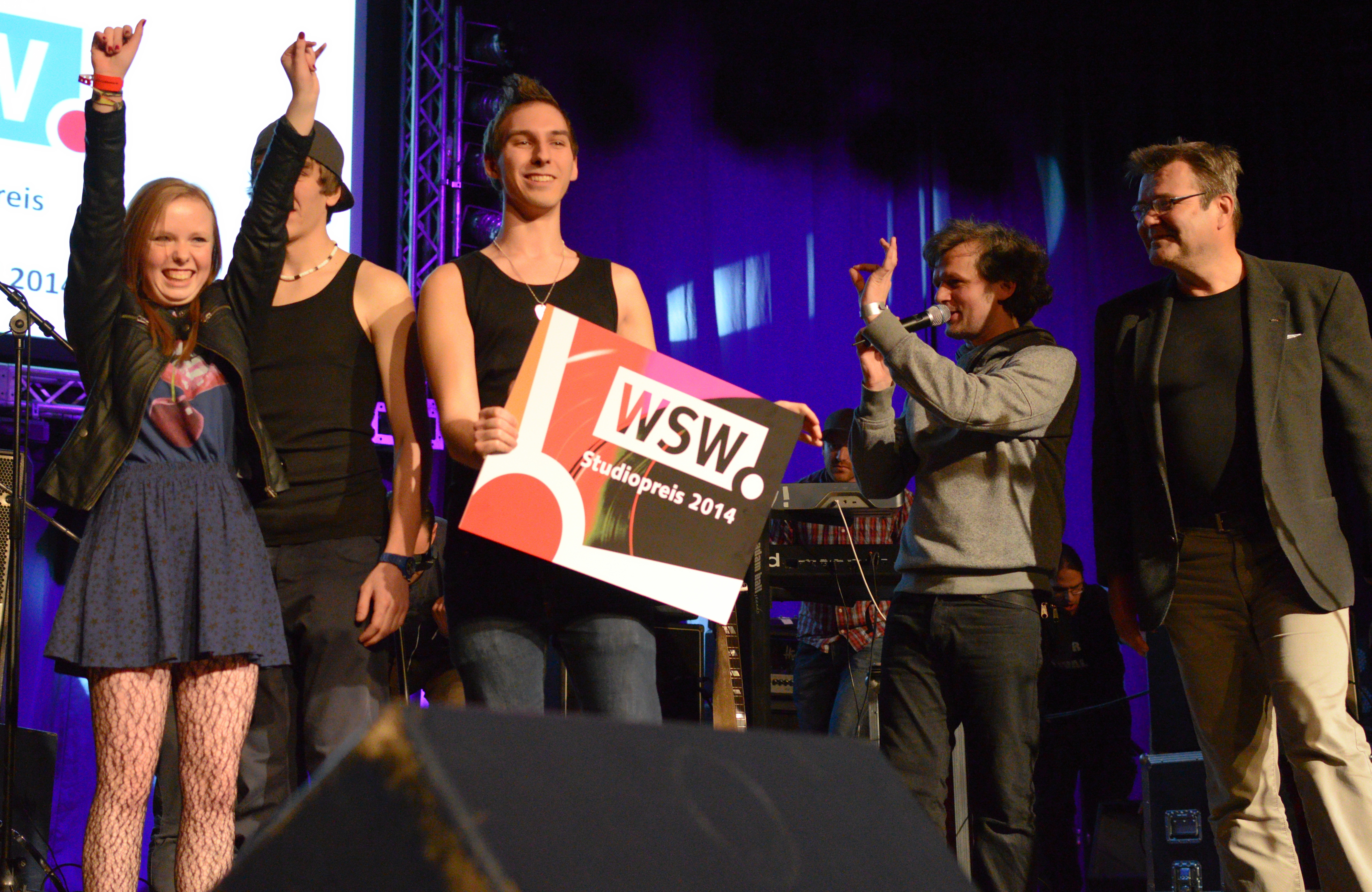 Verleihung des Studiopreises beim Schüler-Rockfestival 2014 an The Original Disaster.